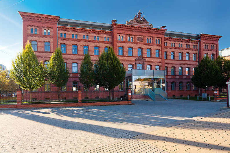 Historisches Benary-Gebäude im Erfurter Stadtteil Brühl